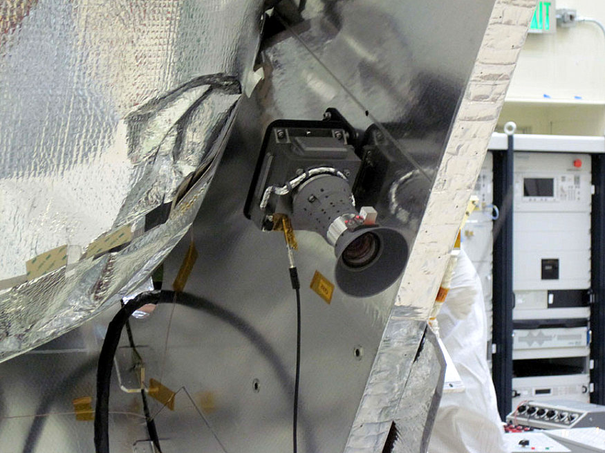 Caméra Junocam de la sonde spatiale JUNO de la NASA